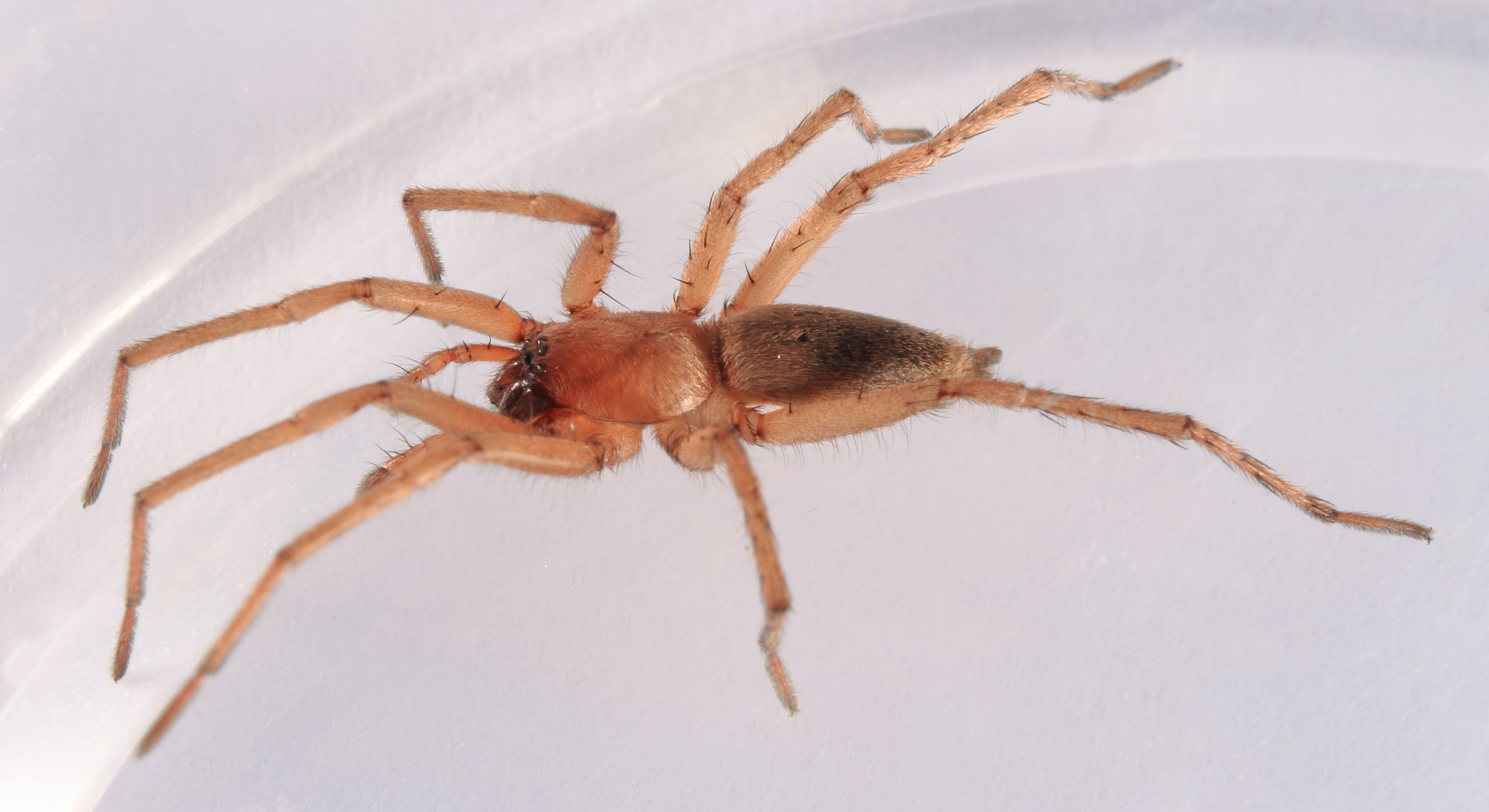 Drassodes vermutlich D. lapidosus, Körperlänge ca 8mm, gefunden im Garten Die abgebildete Spinne wurde am 7. Juni 2015 von Mhohner auf WP:RBIO/B bestimmt The spider shown here has been identified by Mhohner on WP:RBIO/B 2015, June 7th